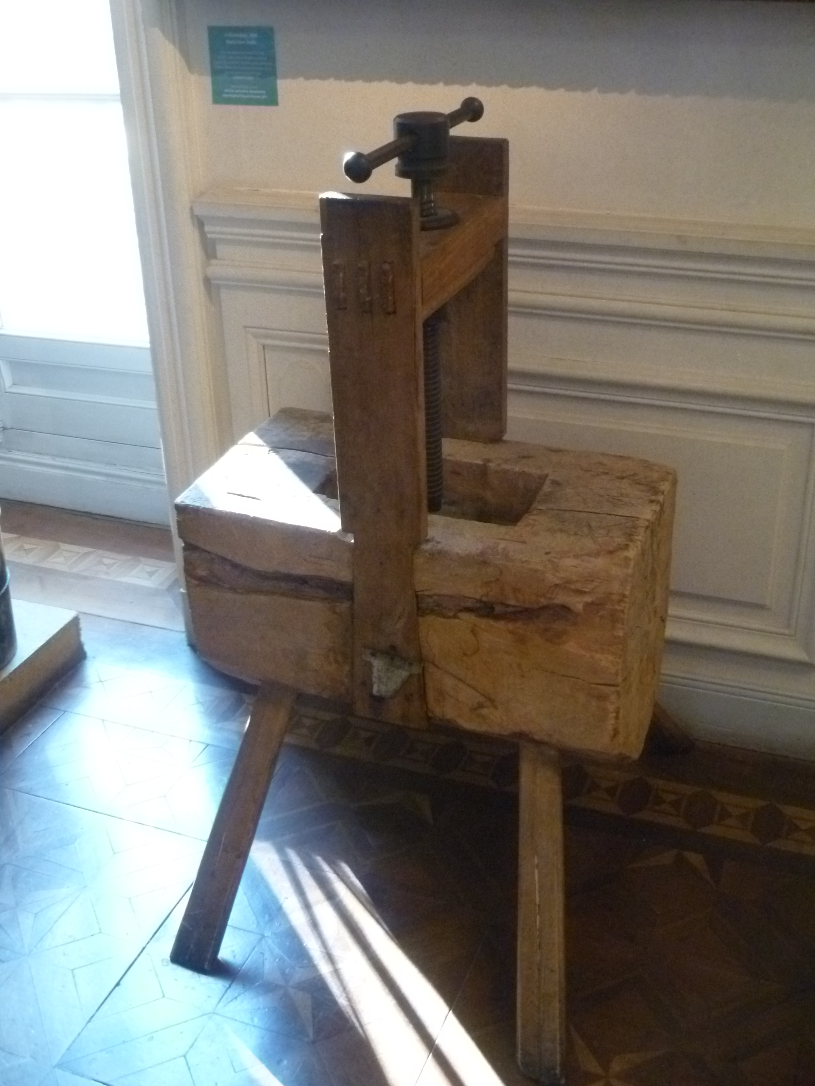 Presse à genièvre, Musée de la Vallée, Barcelonnette, France